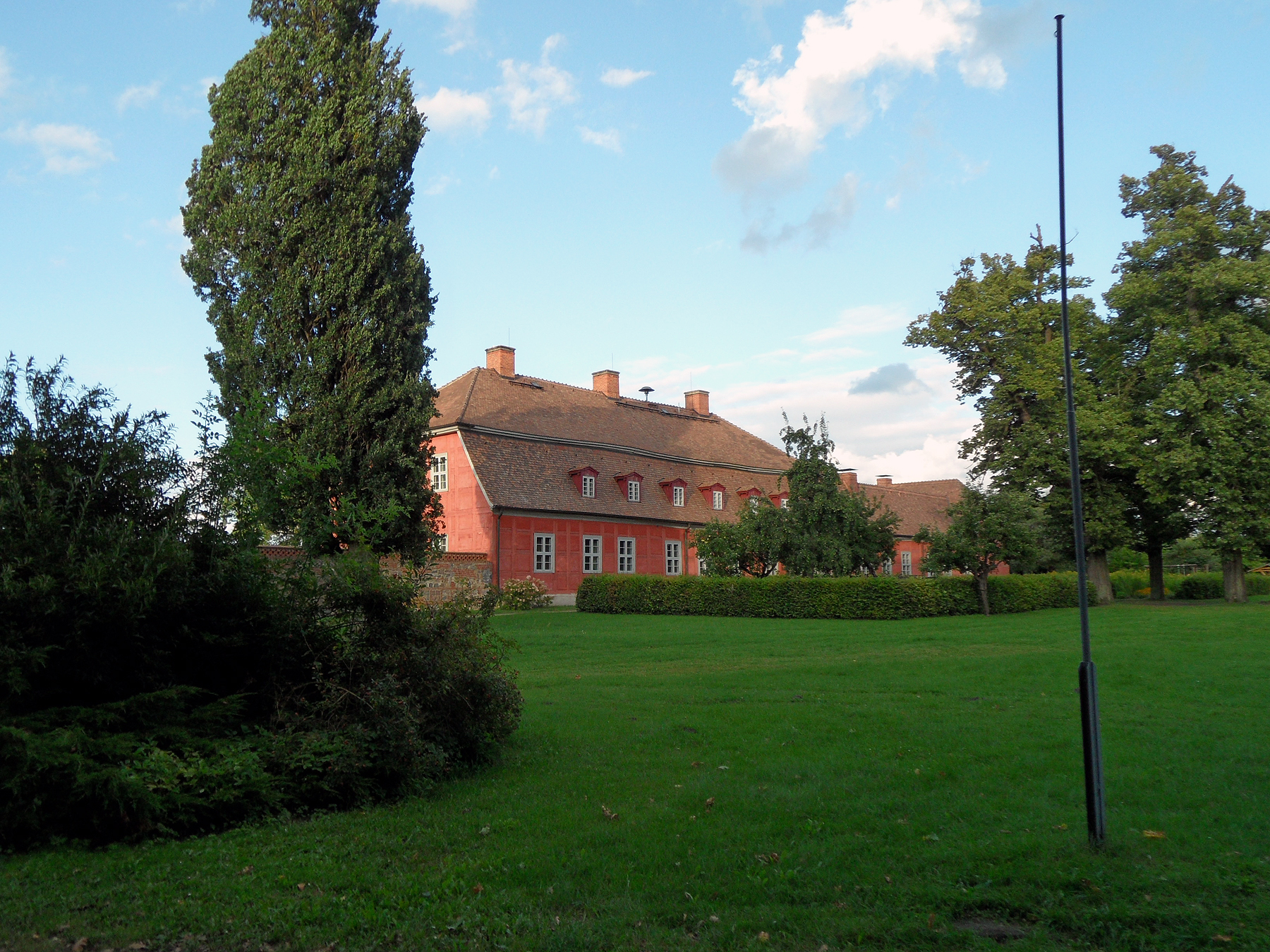 Schloss Rothenklempenow in Mecklenburg-Vorpommern, vormaliger Stammsitz der Familie von Eickstedt Datum: 19.08.2011 Urheber: onnola (Flickr-User) Quelle